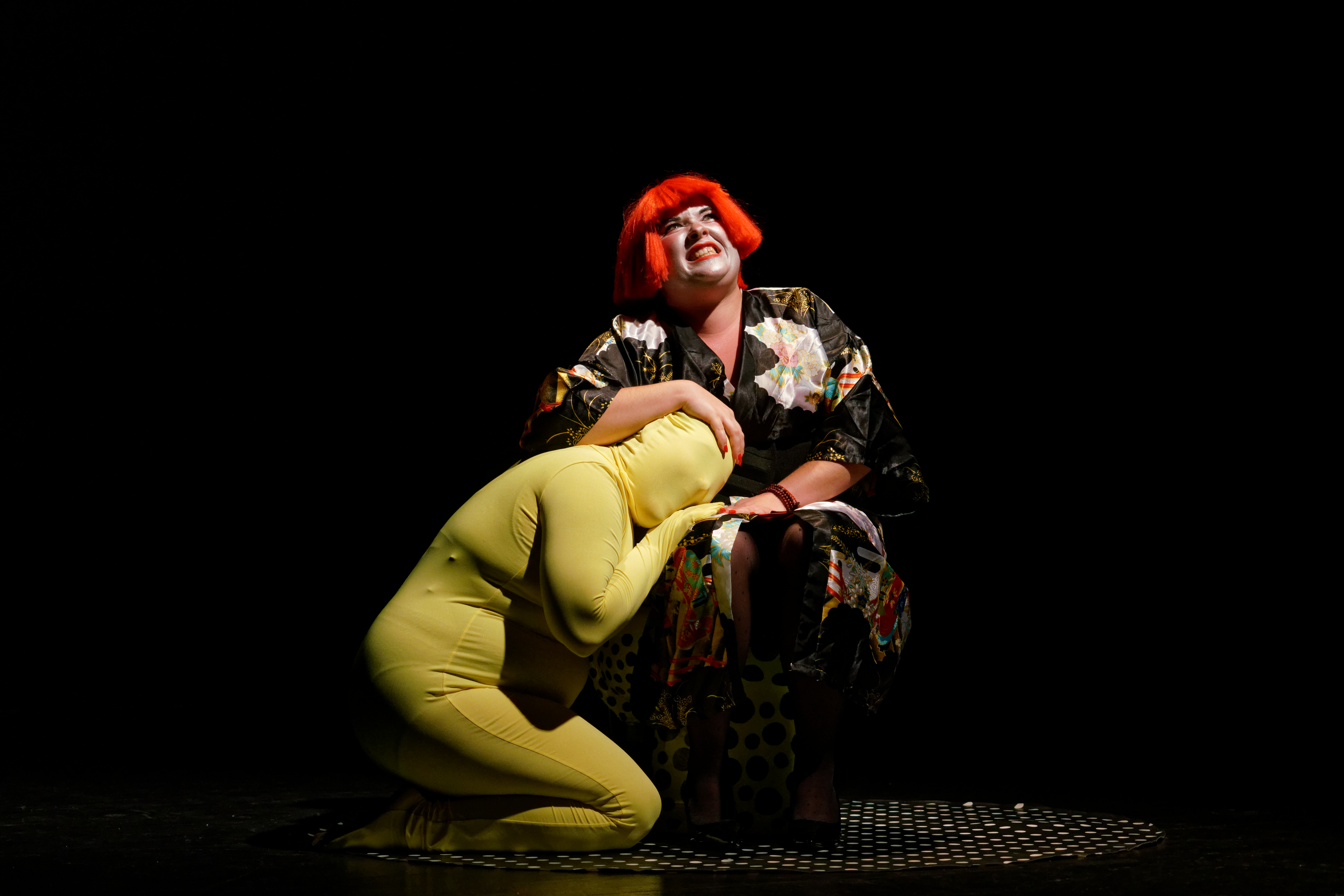 Espectáculo Kusama e Warhol: o maior roubo da pop, das Produções D. Mona.